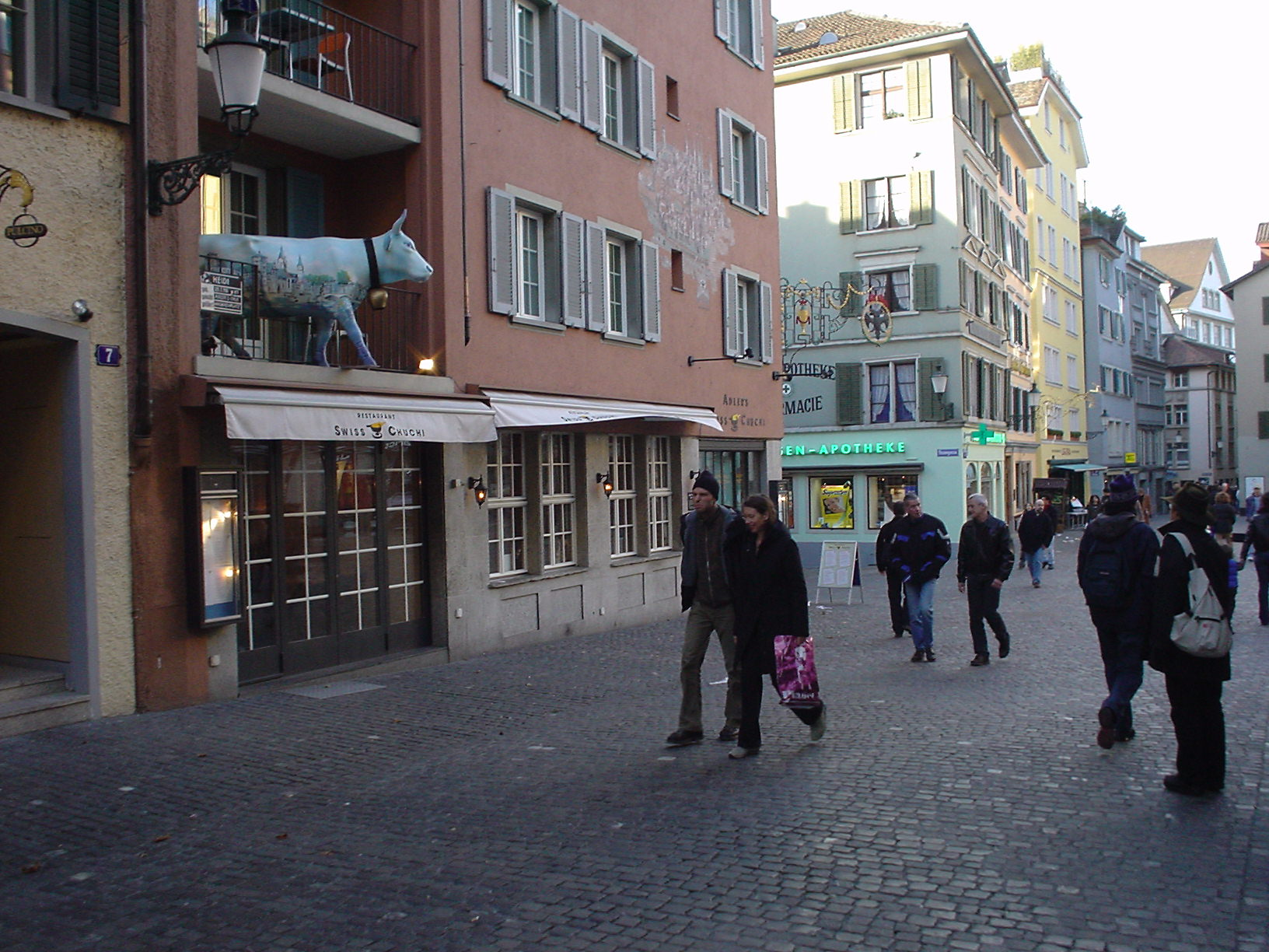 Zuerich Altstadt